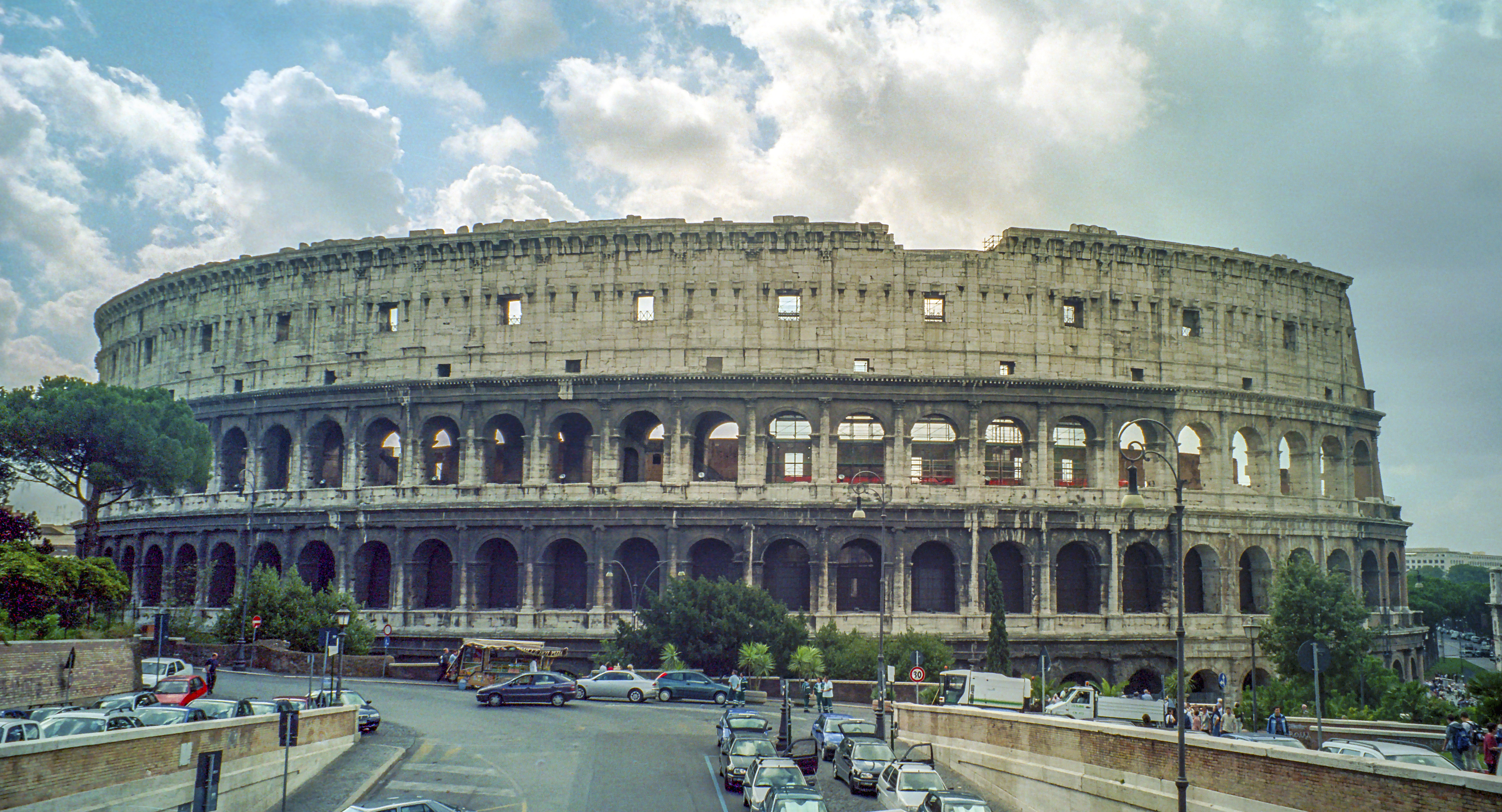 Roma, Colosseo